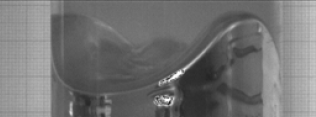 Двуфлуидна система от електролит (калиева основа) и Галинстан в плексигласов цилиндър осцилиращи във вертикално направление. Наблюдава се осцилиращ режим 21. © 2007 М. Куйлеков